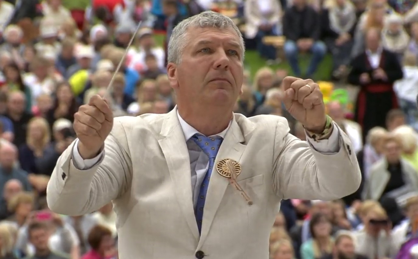 Kuvatõmmis. Ott Kask 2017. aasta XII Noorte Laulupeol „Mina jään“ dirigeerimas Priit Raiki lugu „Tormakas algus“. Pilt pärineb Eesti Rahvusringhäälingu arhiivist.